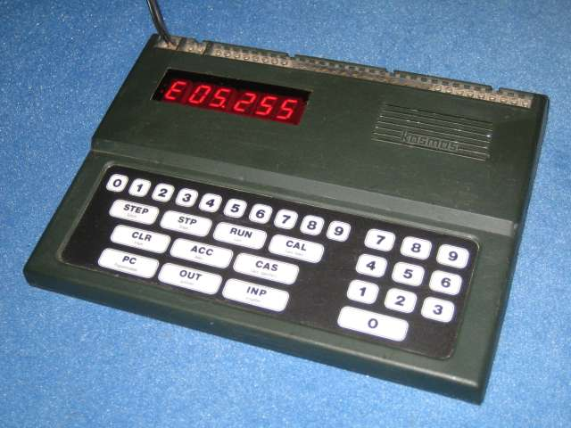 Bildbeschreibung: Kosmos CP1 Quelle: selbst fotografiert Fotograf/Zeichner: Midas Datum: 2006-05-22